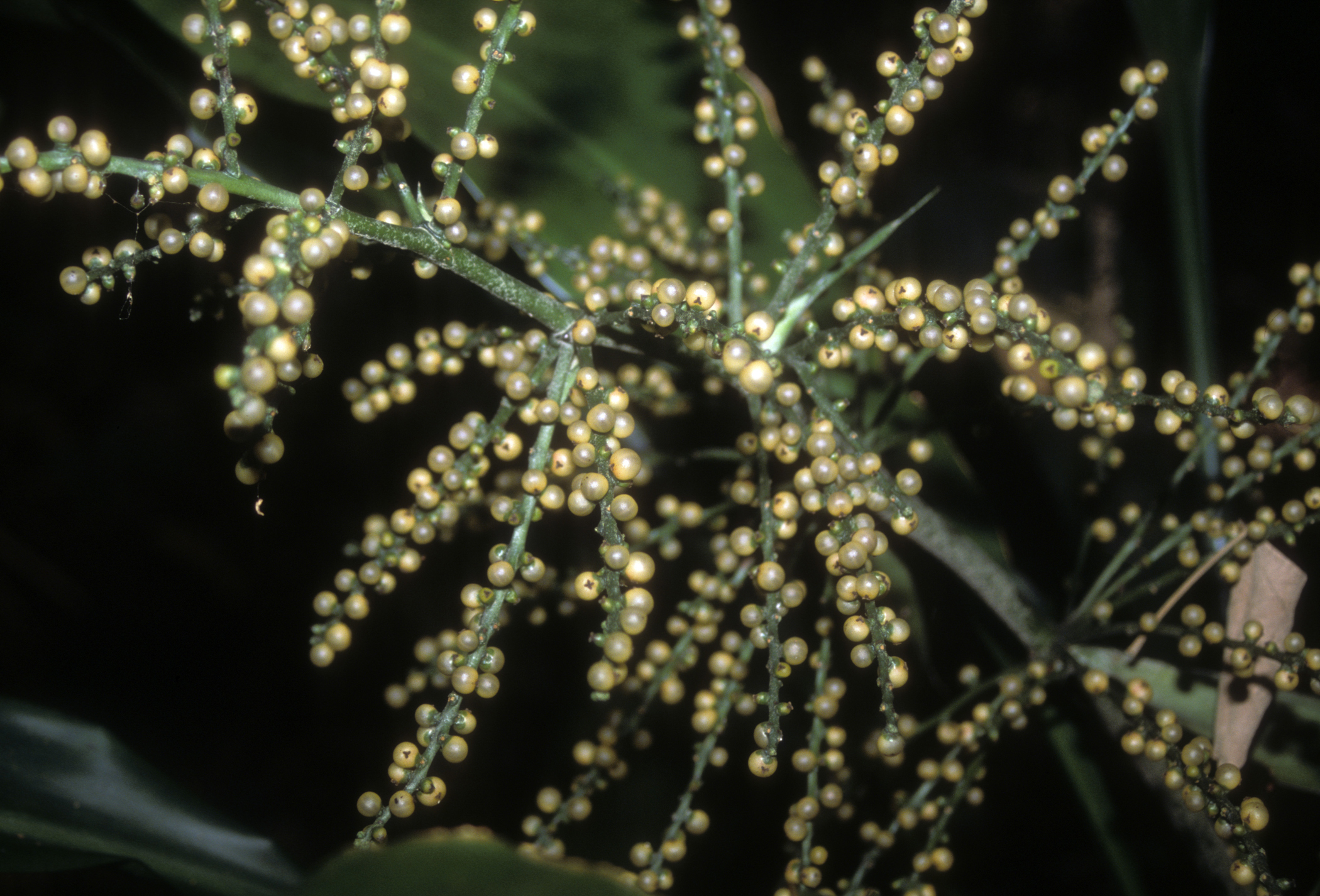 Hanguana malayanan - Bukit Bandi, Terengganu, Malaysia, Oct. 2002.